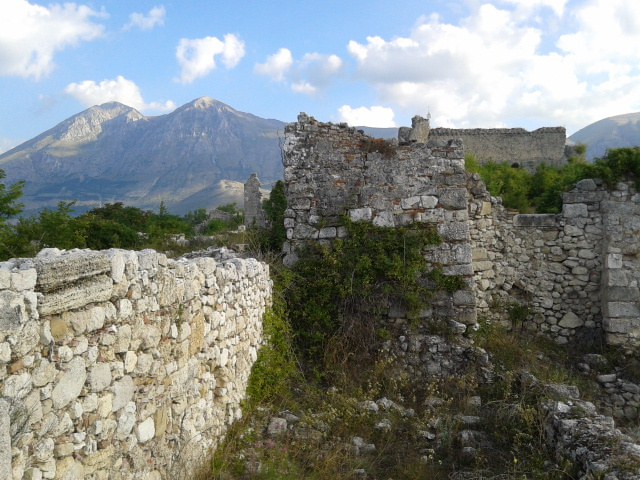 Ruderi di Albe, sullo sfondo le cime sorelle del monte Velino